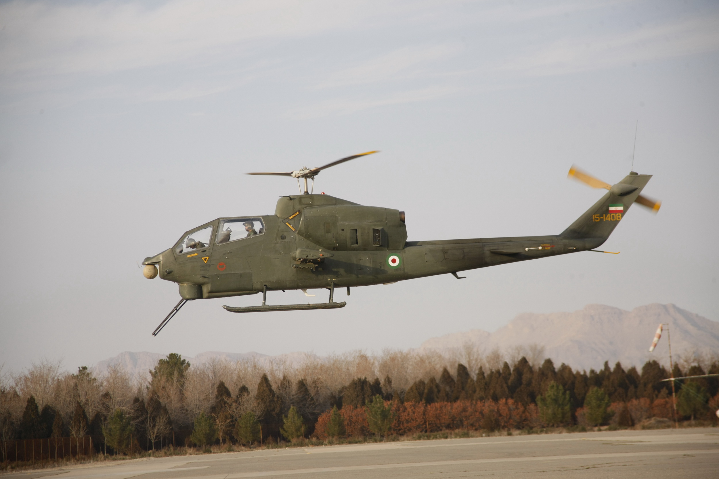 بالگرد توفان 2 متعلق به سپاه پاسداران جمهوری اسلامی ایران